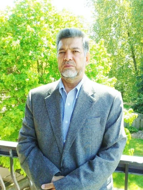 دکتر سلطان حمید سلطان